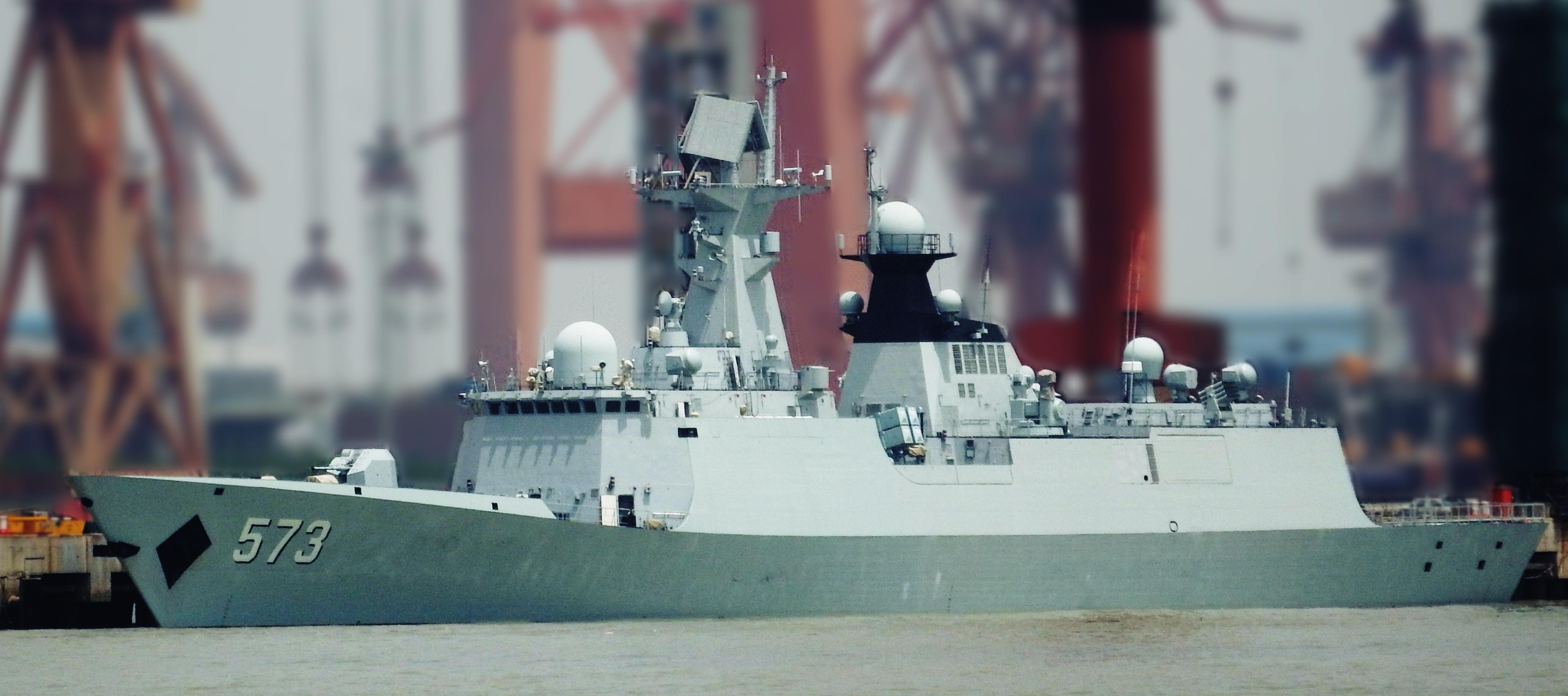 中文（中国大陆）: 停靠在江南造船厂边的“柳州”号导弹护卫舰。